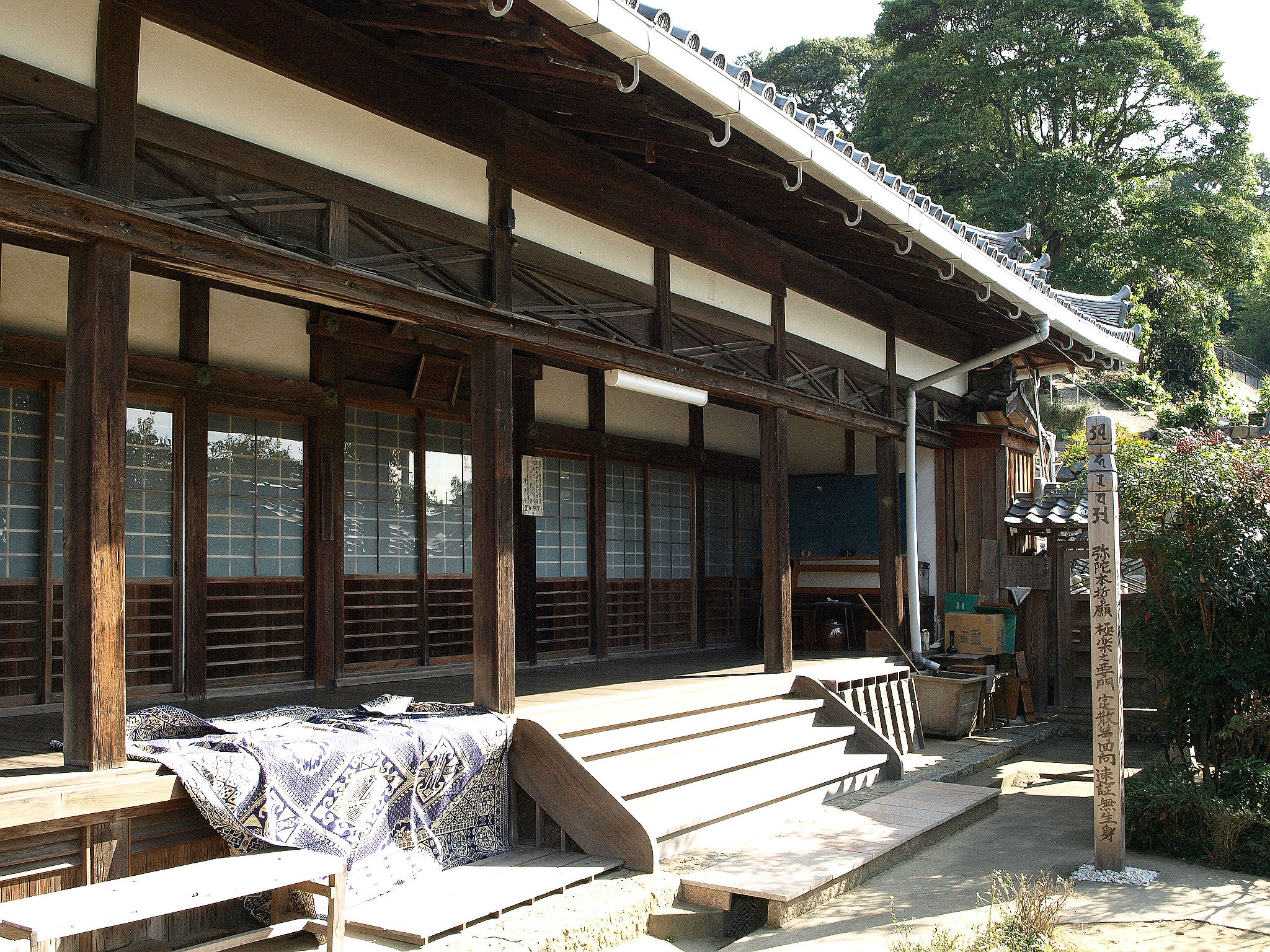 浄運寺 本堂 兵庫県たつの市御津町室津